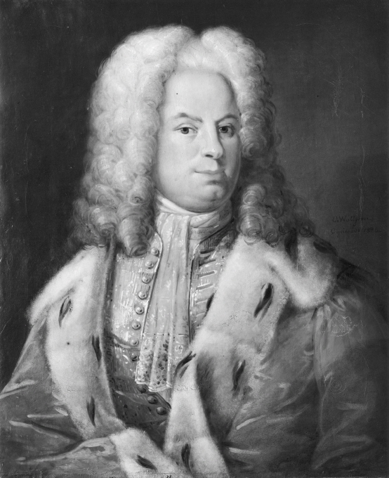 Gustaf Bonde, svensk, Född 1682, Död 1764.